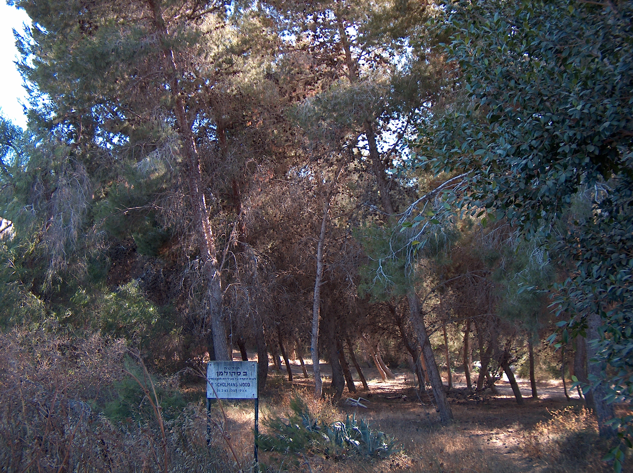 שלט המוקיר את פועלה של ברכה סקולמן למען כפר הנוער ניצנים, בחורשה הנושאת את שמה